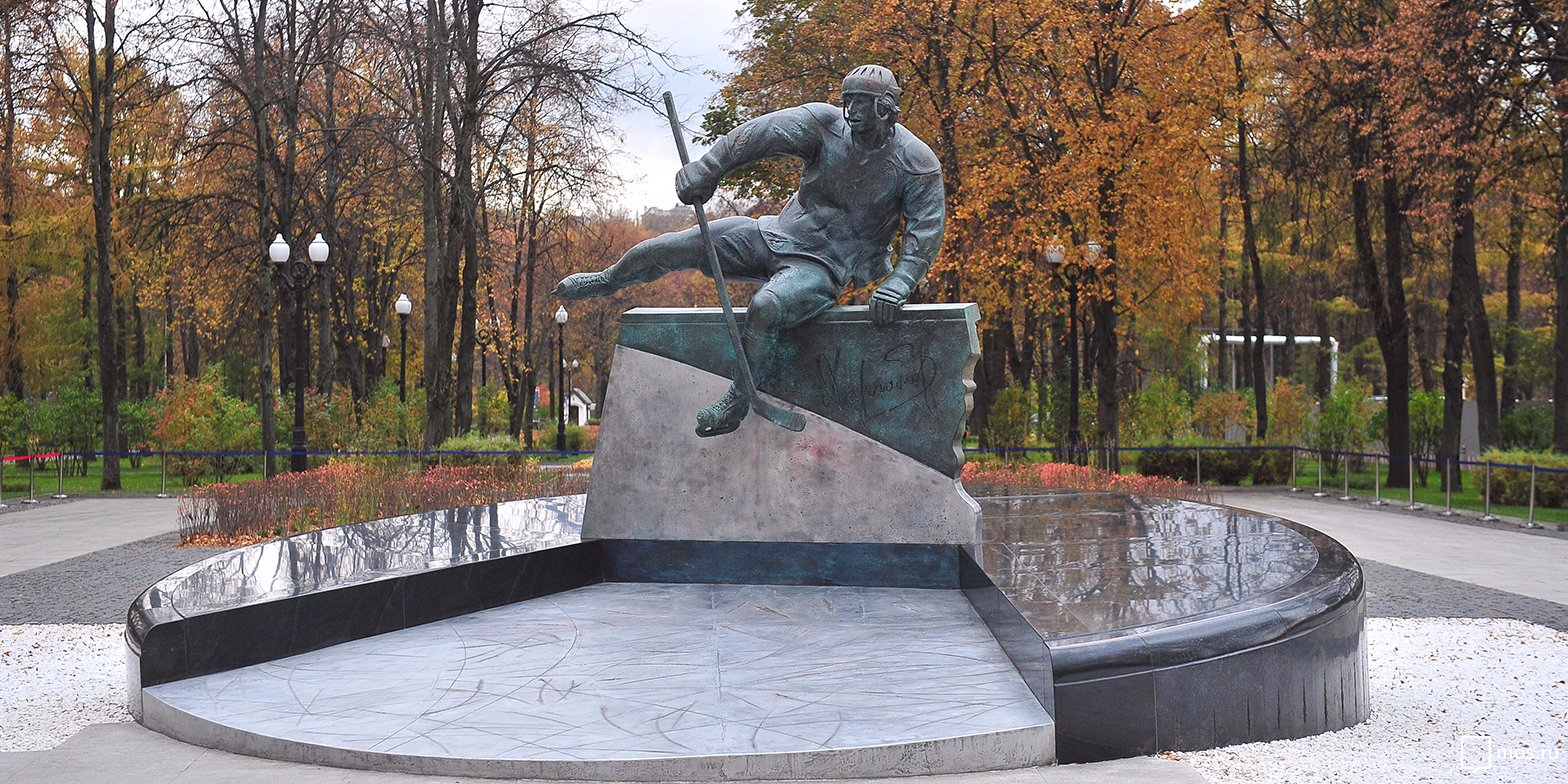 памятник Валерию Харламову на аллее Славы спорткомплекса «Лужники» в Москве